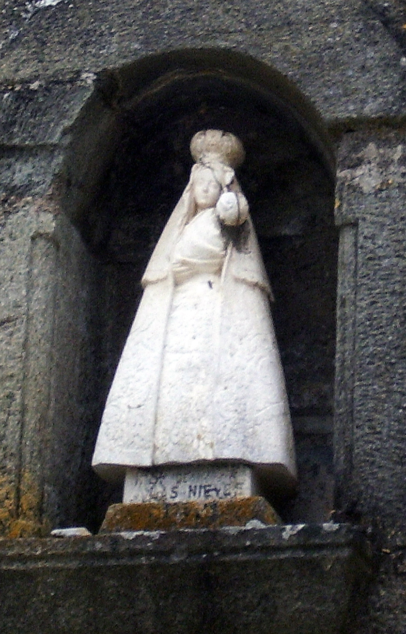 imagen virgen de las nieves